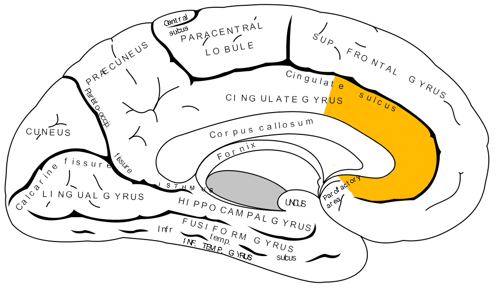 Anterior cingulate cortex.